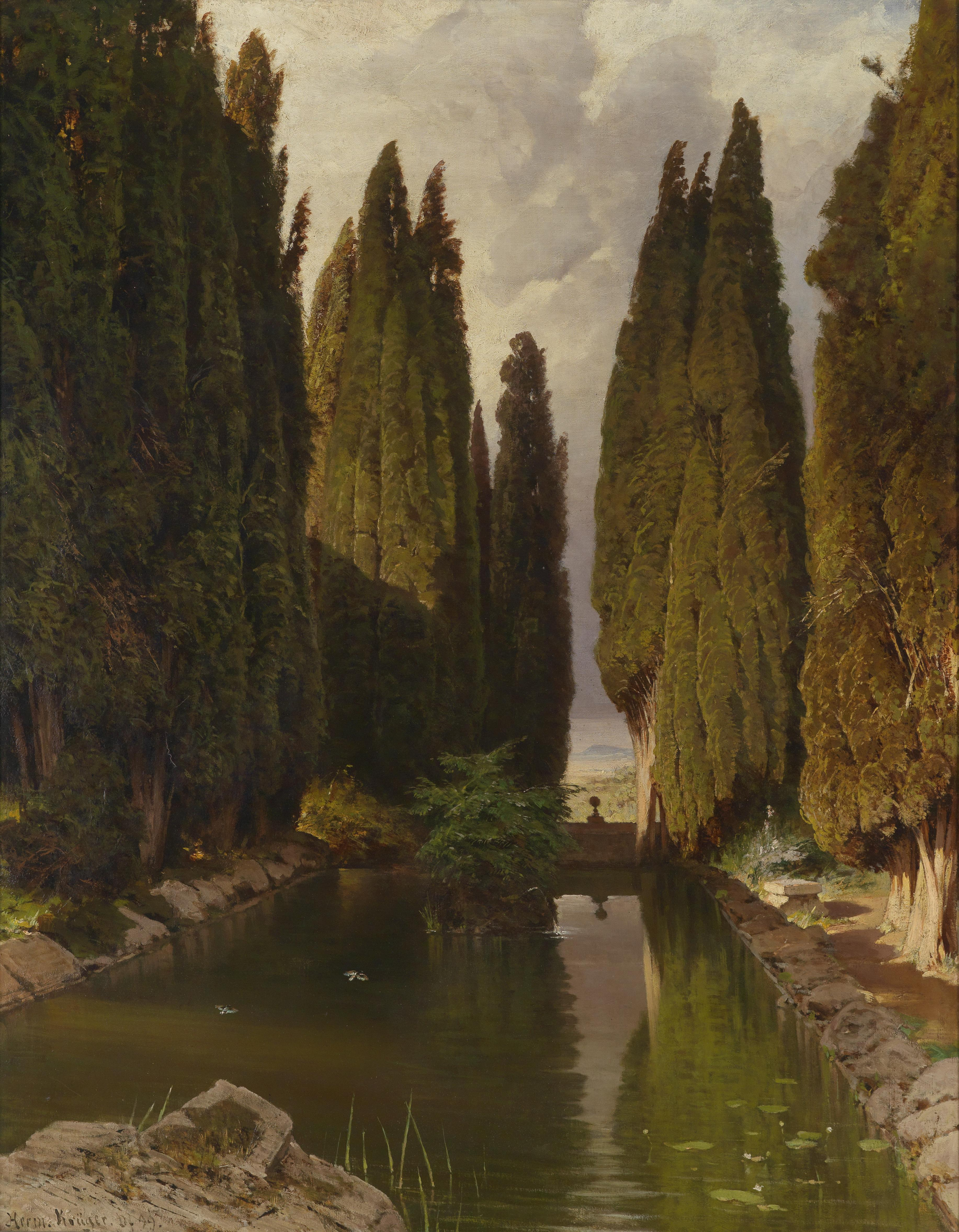 Park bei Rom, Blick auf die Albaner Berge, signiert, datiert Herm. Krüger Df.(18)99, Öl auf Leinwand, 97x 75 cm